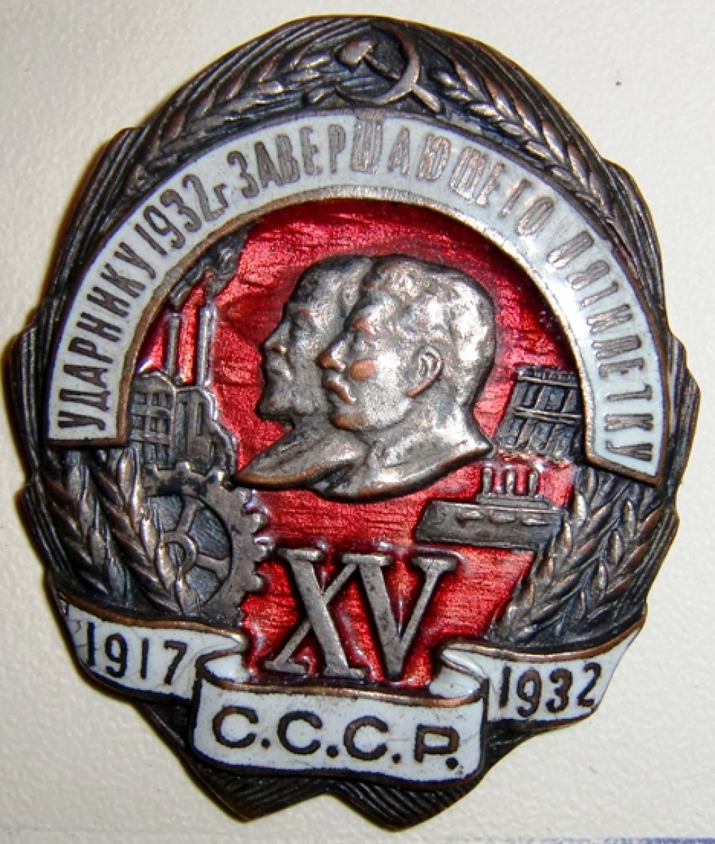 Общесоюзный знак ударника 1932 года "Завершающего пятилетку"